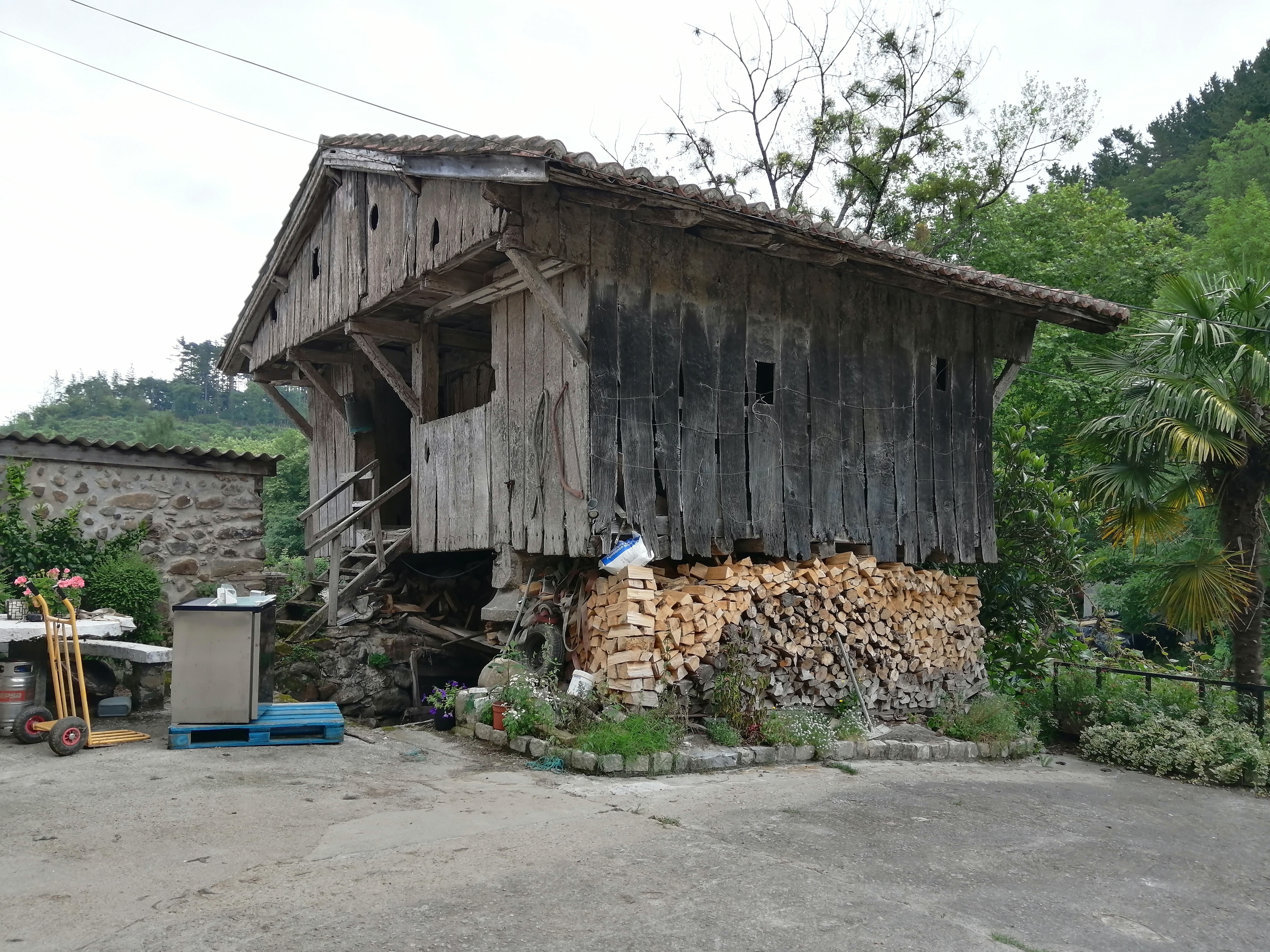 Ibarguengo garaia Etxebarrian